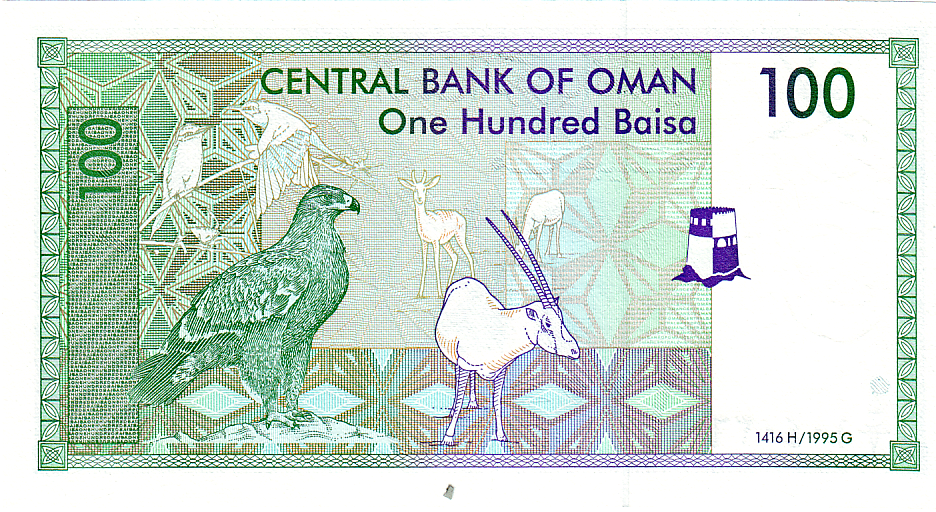 Reverso del Billete de 100 Baisa